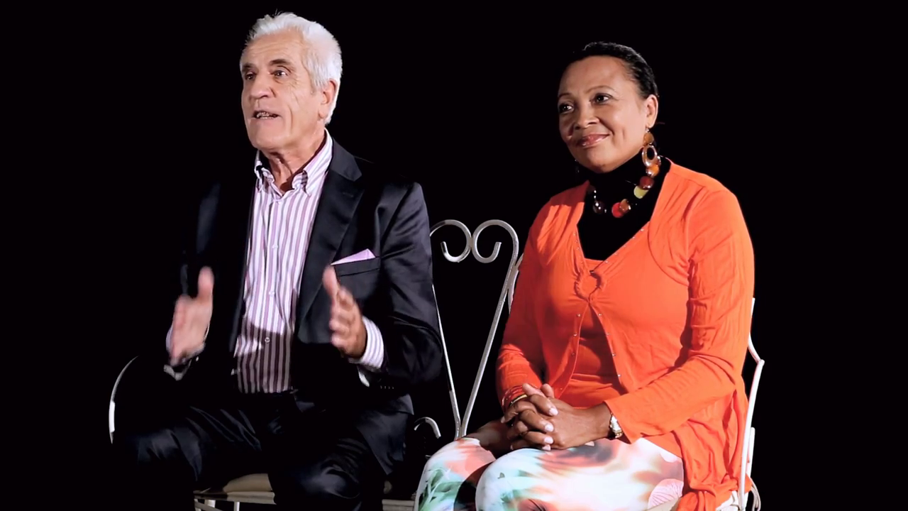 Christian Tal Schaller et Johanne Razanamahay dans le documentaire De la Peur à la Joie